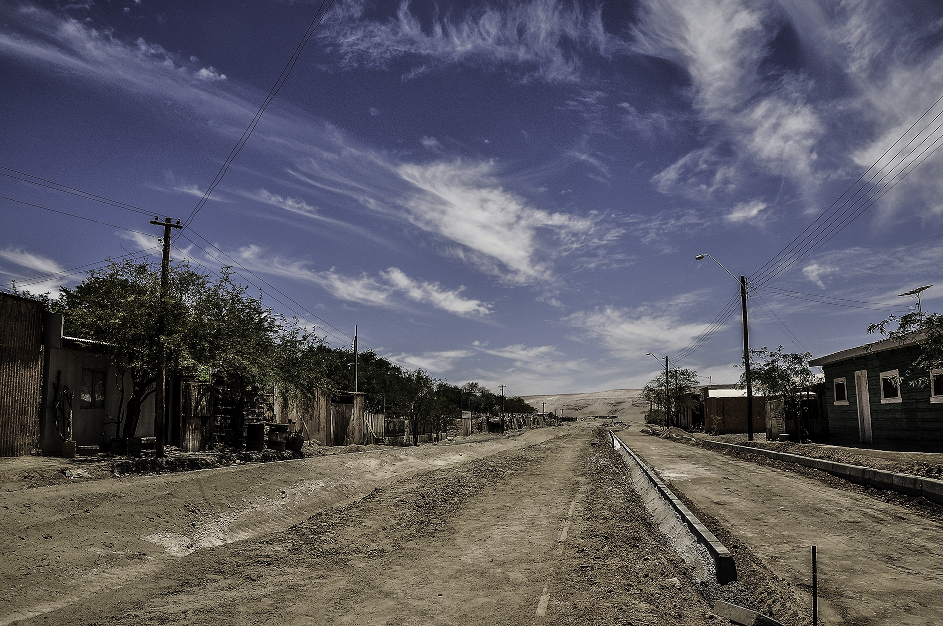 Calles de Quillagua. Quillagua es el punto más seco del planeta.